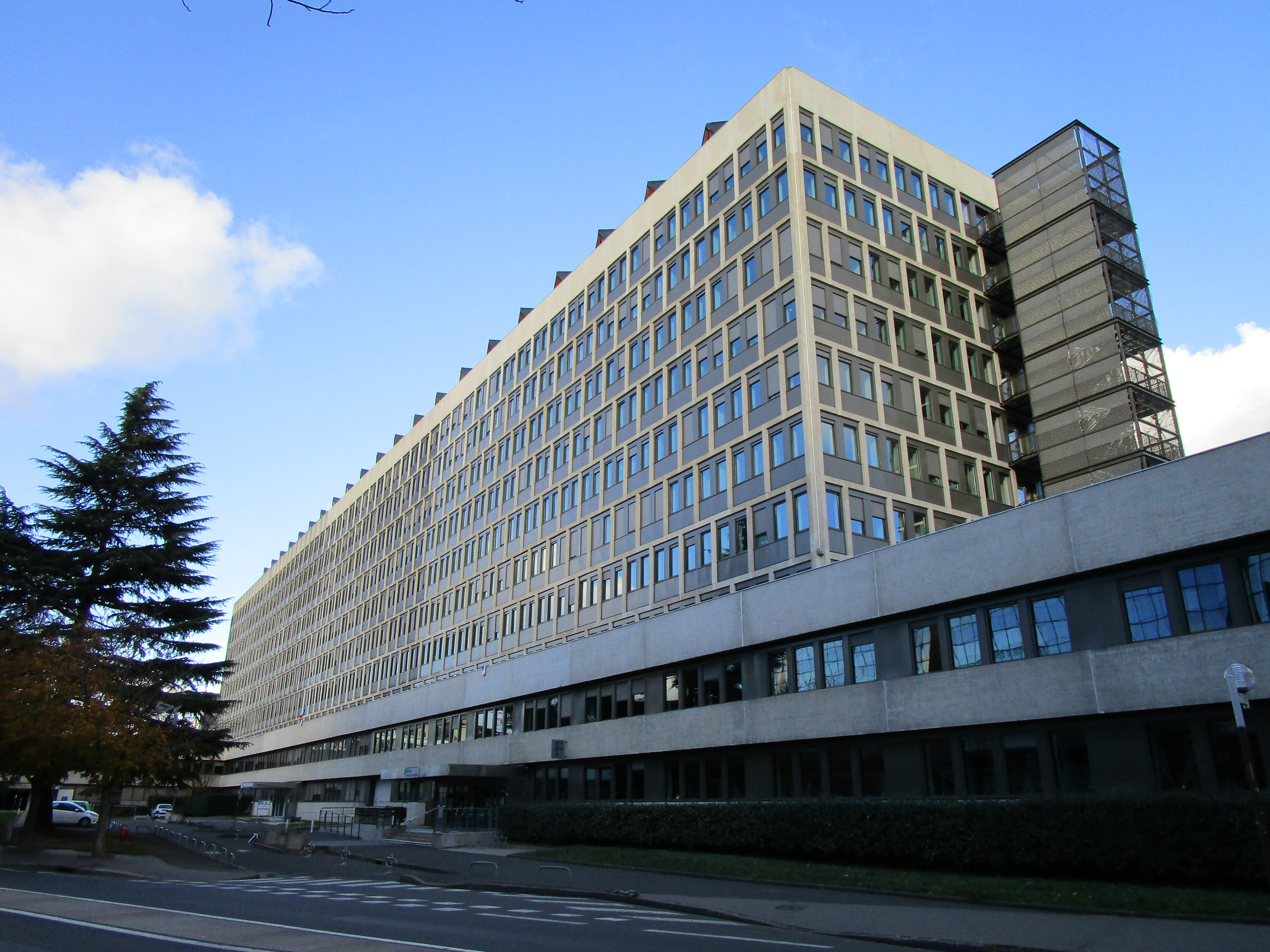 Les bâtiments du Conseil général d'Indre-et-Loire à Tours, qui accueillent aussi la caisse primaire d'assurance maladie, la CAF et les impôts.